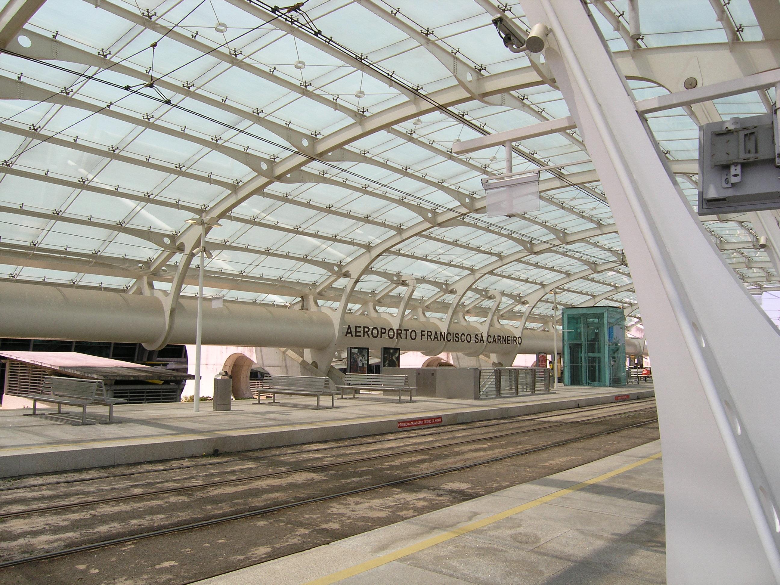 Metro Aeroporto Francisco Sá Carneiro